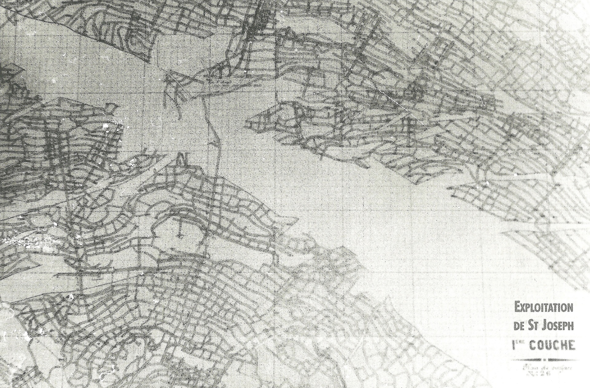 Plan des travaux du puits Saint-Joesph (Houillères de Ronchamp).